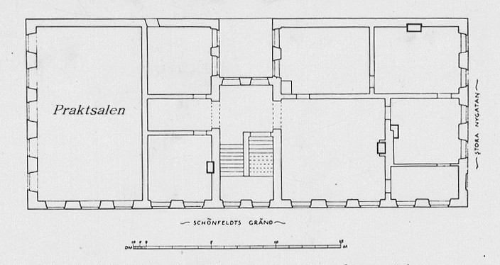 Schönfeldtska huset, planritning (översta våning)